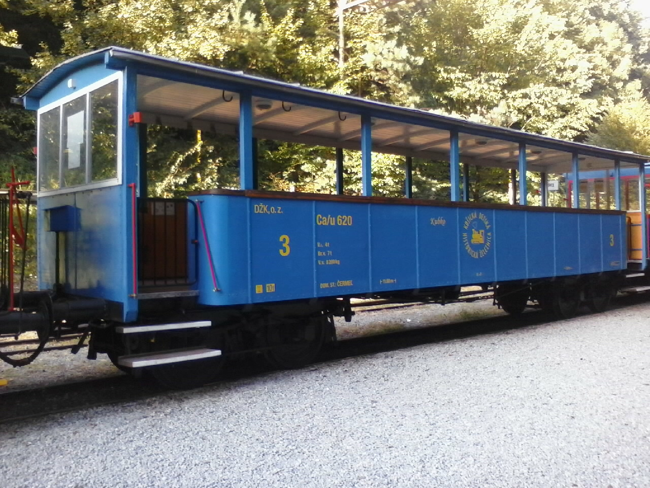 Letný vozeň Ca/u 620 "Kubko" upravený na prepravu bicyklov v stanici Čermeľ.